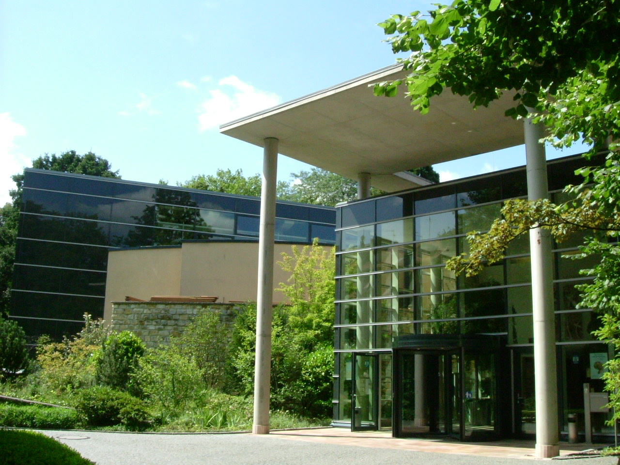 Eingangsbereich der Carolus Thermen